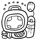 Majų glifas, simbolizuojantis miestą Caracol. Padarytas naudojant freeware Maya font.